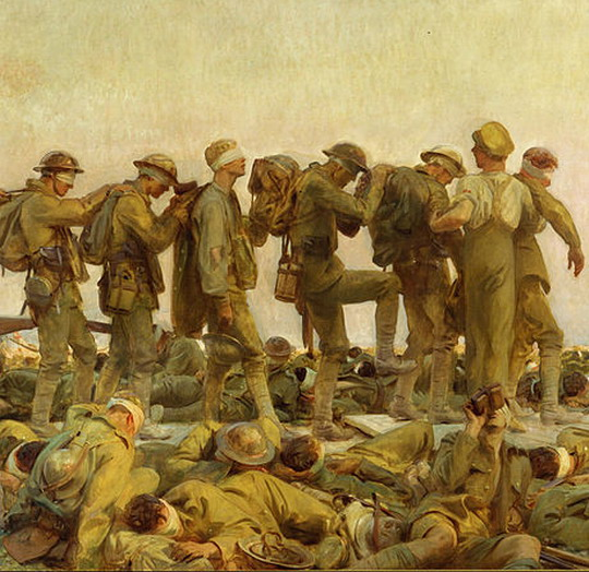 John Singer Sargent (1856–1925) DescriptionAmerican painterDate of birth/death 12 January 1856 15 April 1925Location of birth/death Florence LondonWork location Paris, Netherlands, United Kingdom, United States of America, ItalyAuthority control : Q155626 VIAF: 12466780 ISNI: 0000 0001 0870 9581 ULAN: 500023972 LCCN: n50019335 NAID: 10582208 WorldCat creator QS:P170,Q155626 - Gassed (центр картини)